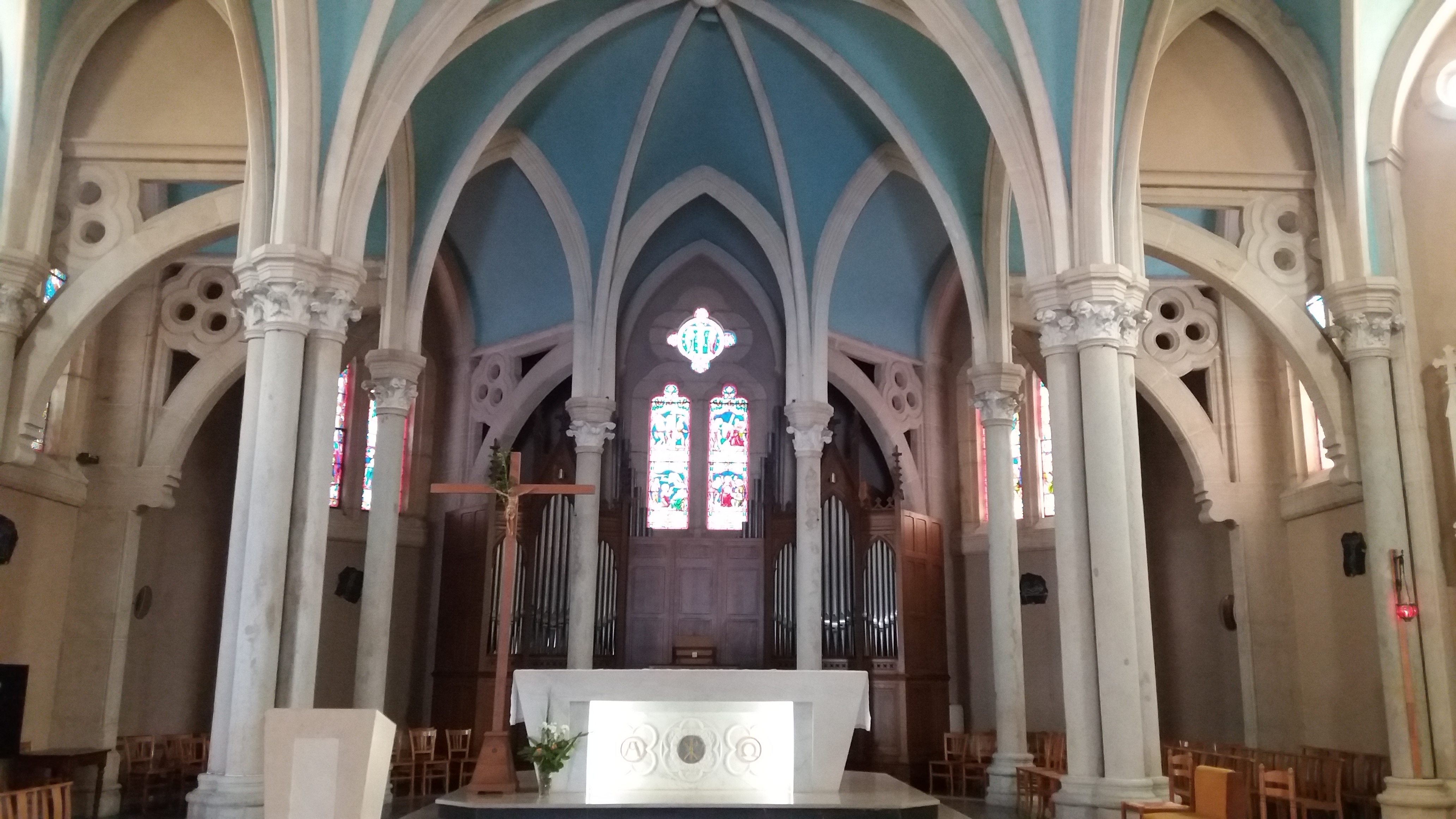 Intérieur : autel en avant de l'abside et orgue.